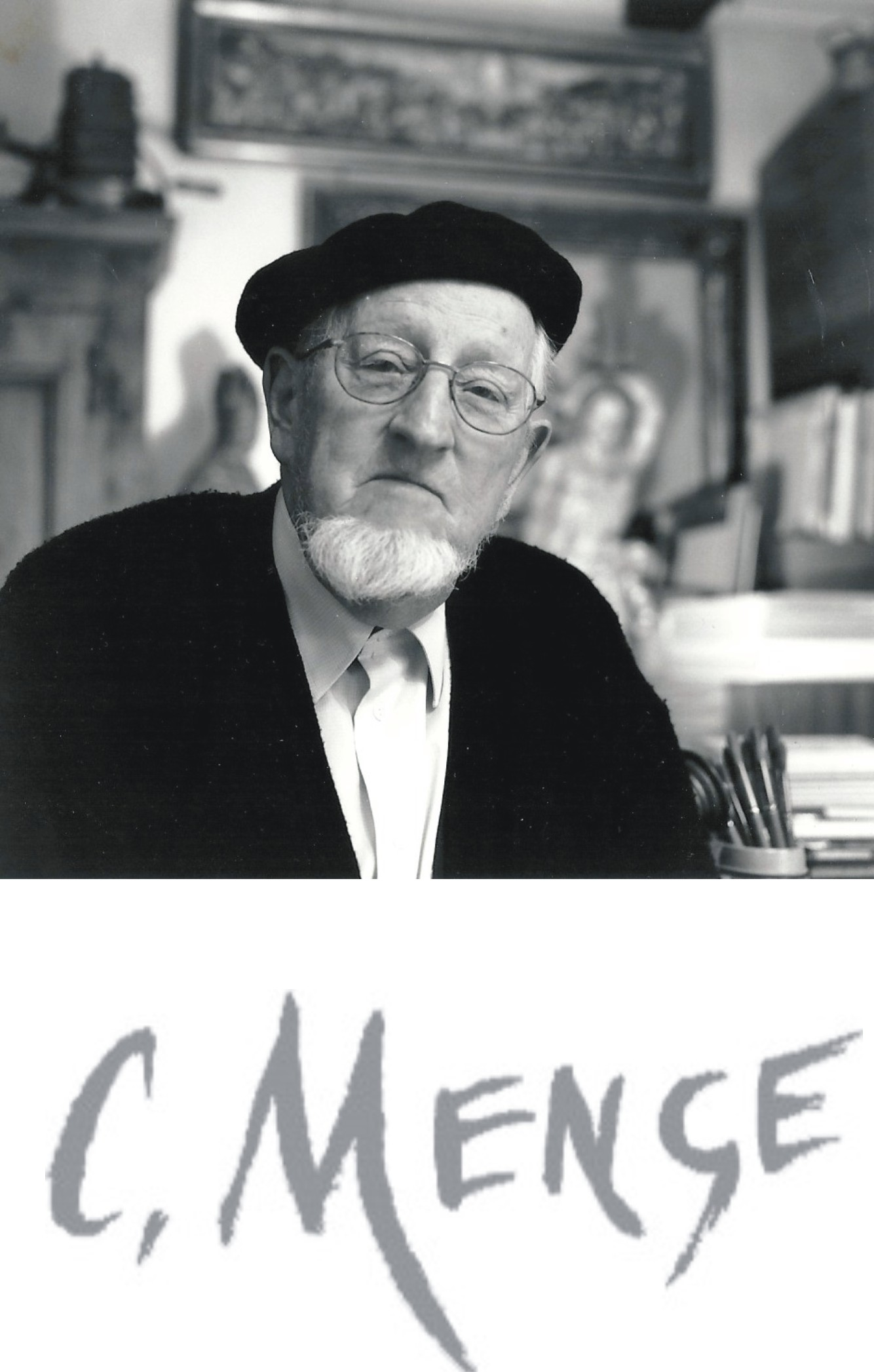 Dans son atelier de Montorge à Sion en Valais